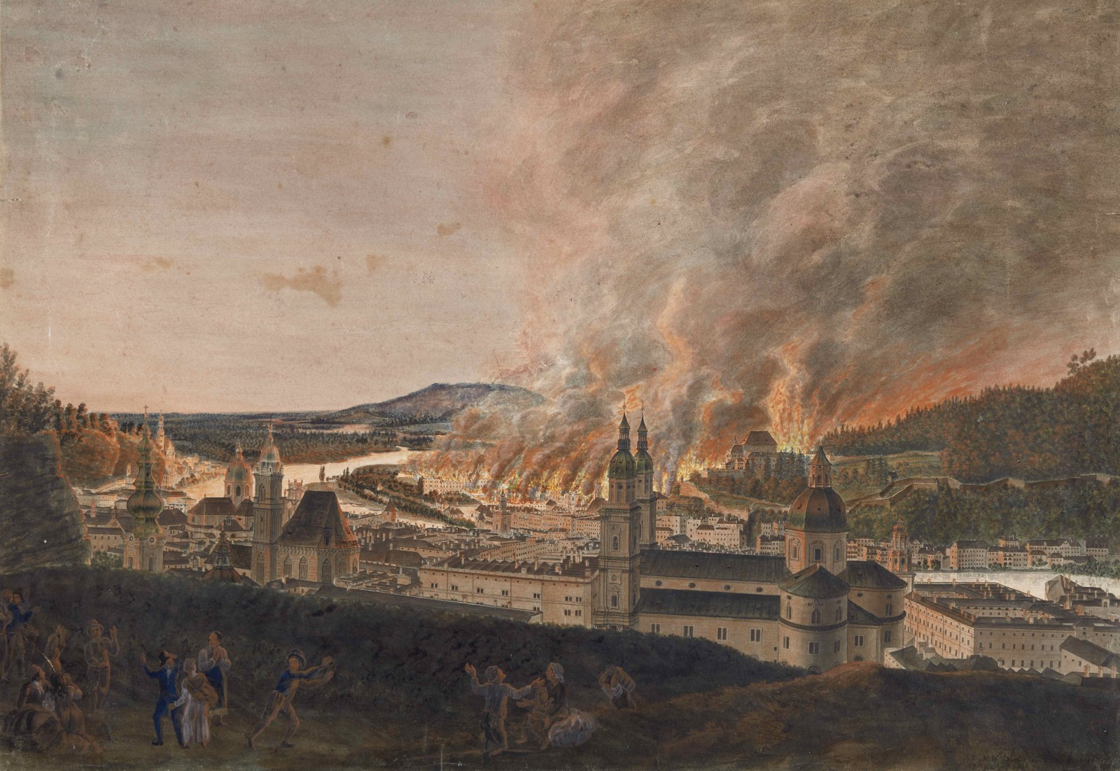 Gemälde - Stadtbrand Salzburg